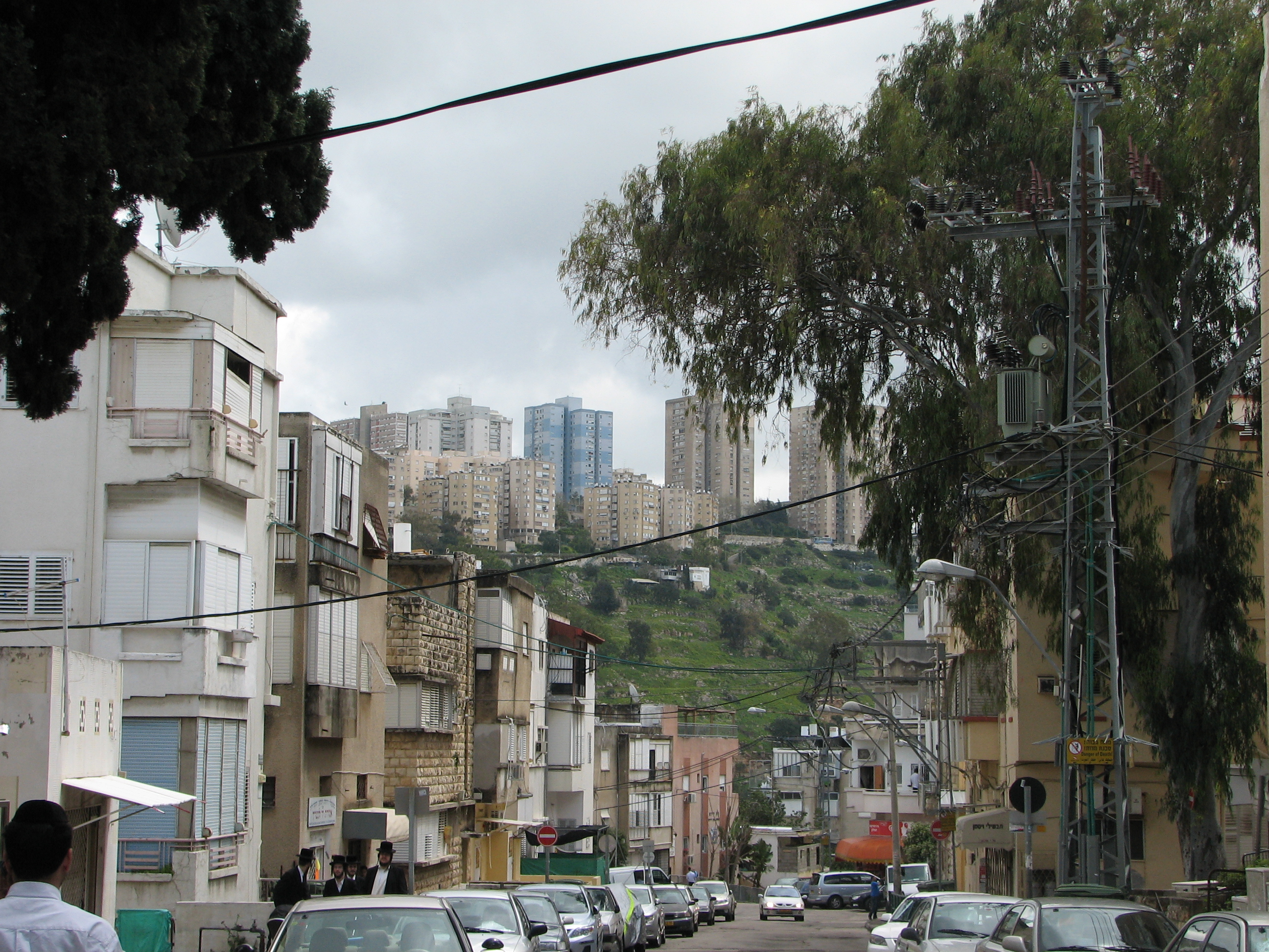 IQuarter Eeast Hadar in Hadar Hacarmel, Haifa Israel רובע הדר מזרח חלק מאזור הדר הכרמל בחיפה. רובע מזרח הדר כולל את השכונות "גאולה, שבתחומה נכללות השכונות ההיסטוריות "נחלה" וגאולה, רמת ויזניץ ואזור יל"ג הכולל את השכונה ההיסטורית "נחלת יהודה" רתוב מיכאל מבט דרומה לכיוון רכס ההר